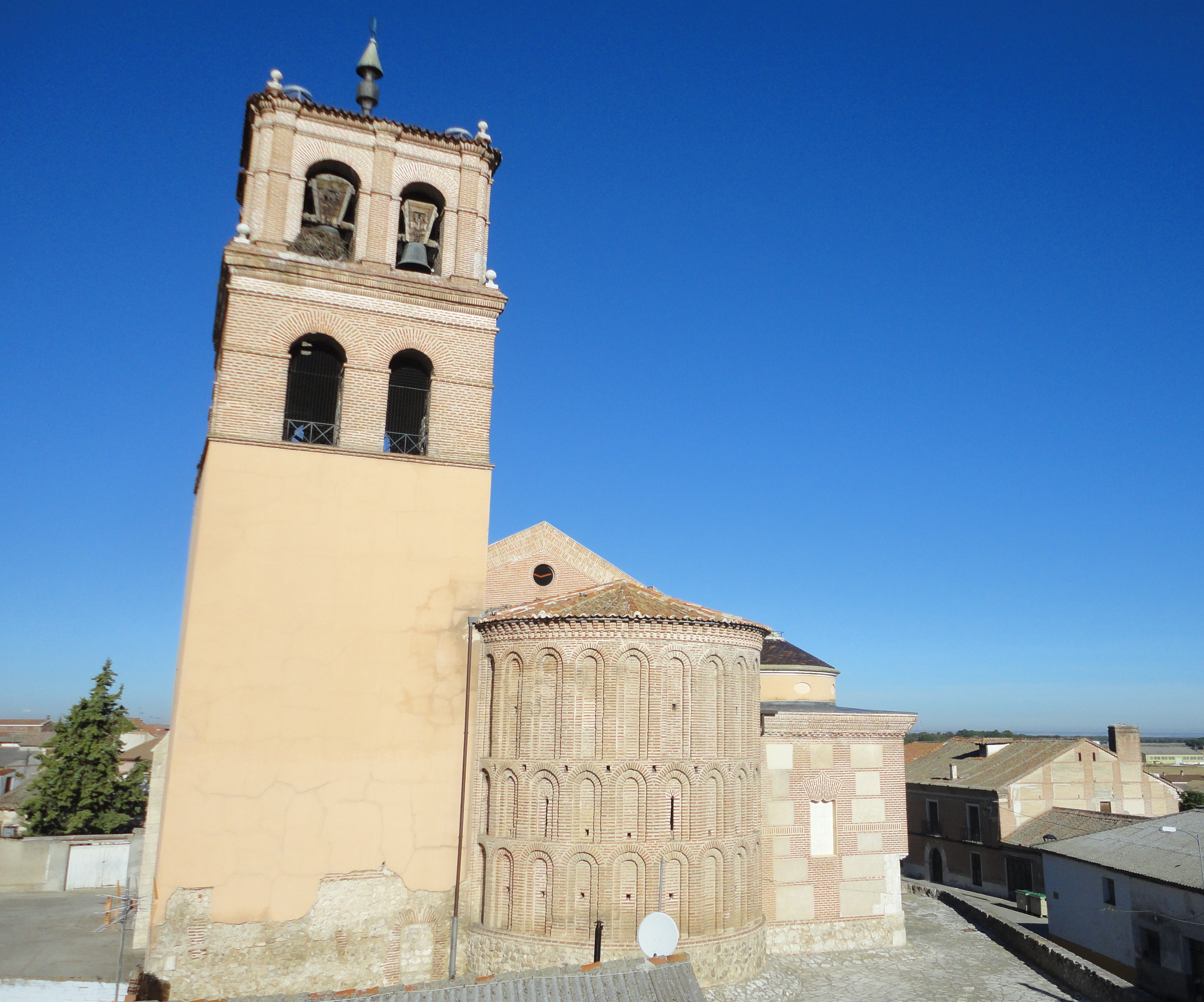 El ábside es románico-mudéjar de finales del Siglo XIII. En su interior se conservan frescos góticos